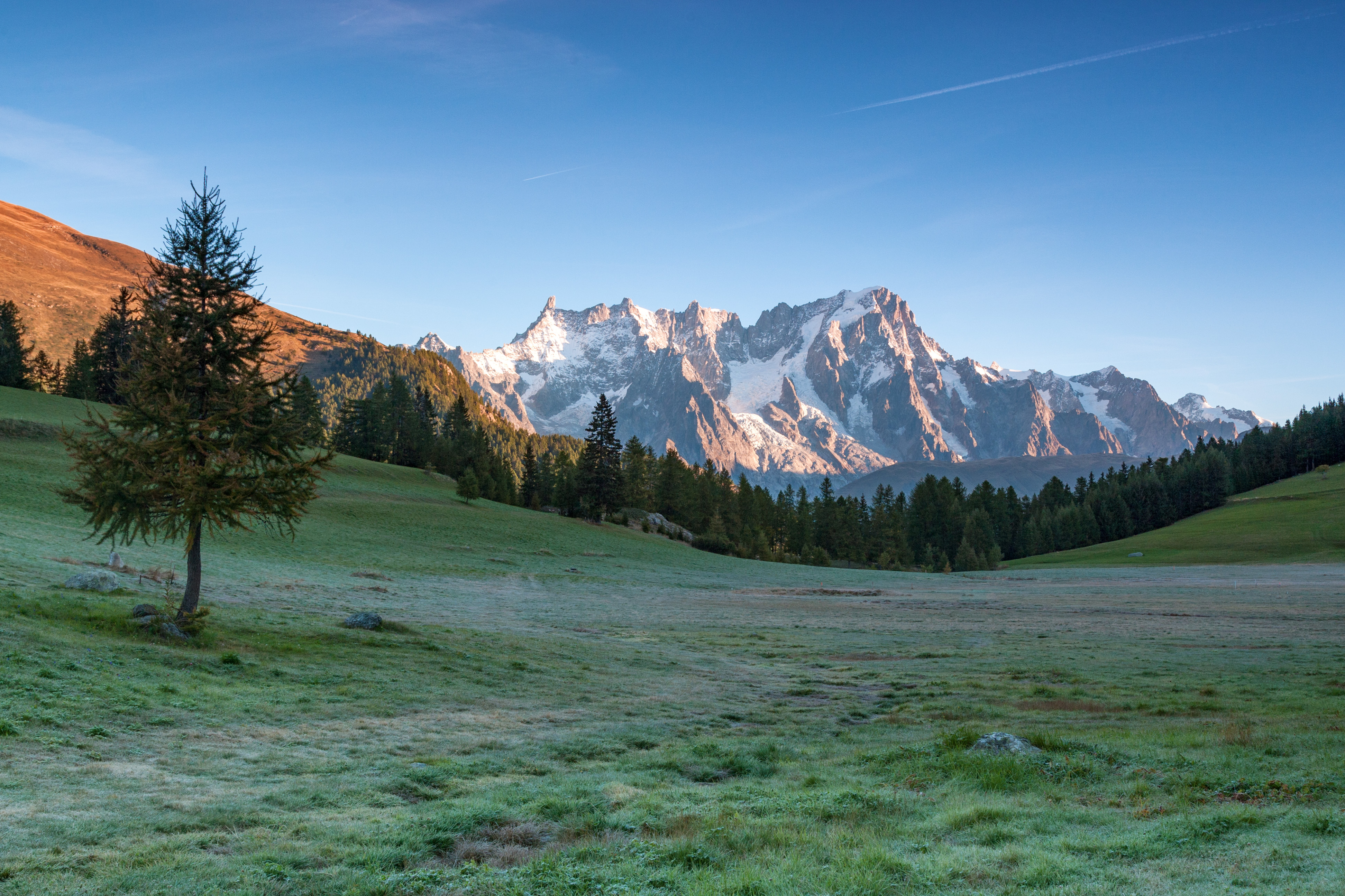 Dente del Gigante e Grandes Jorasses da Petosan This is a photo of a monument which is part of cultural heritage of Italy.